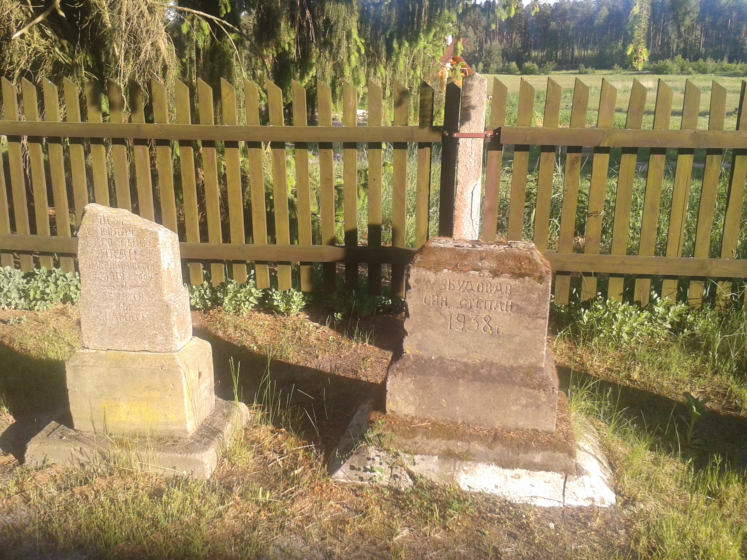 Zniszczone nagrobki na cmentarzu przycerkiewnym w Suchawie